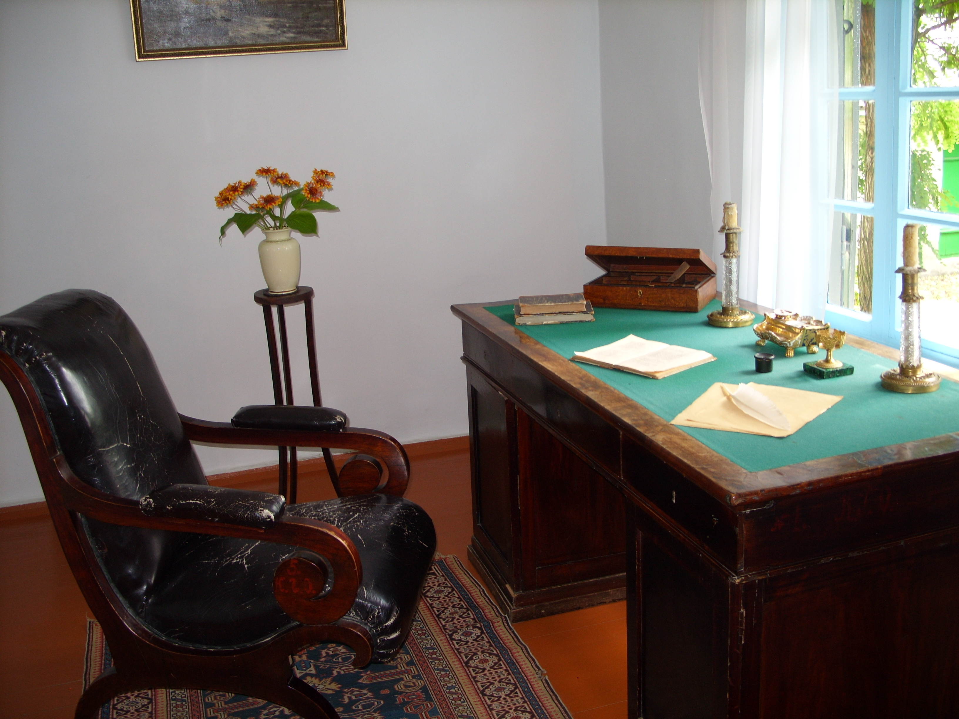 снимок июля 2009 г.